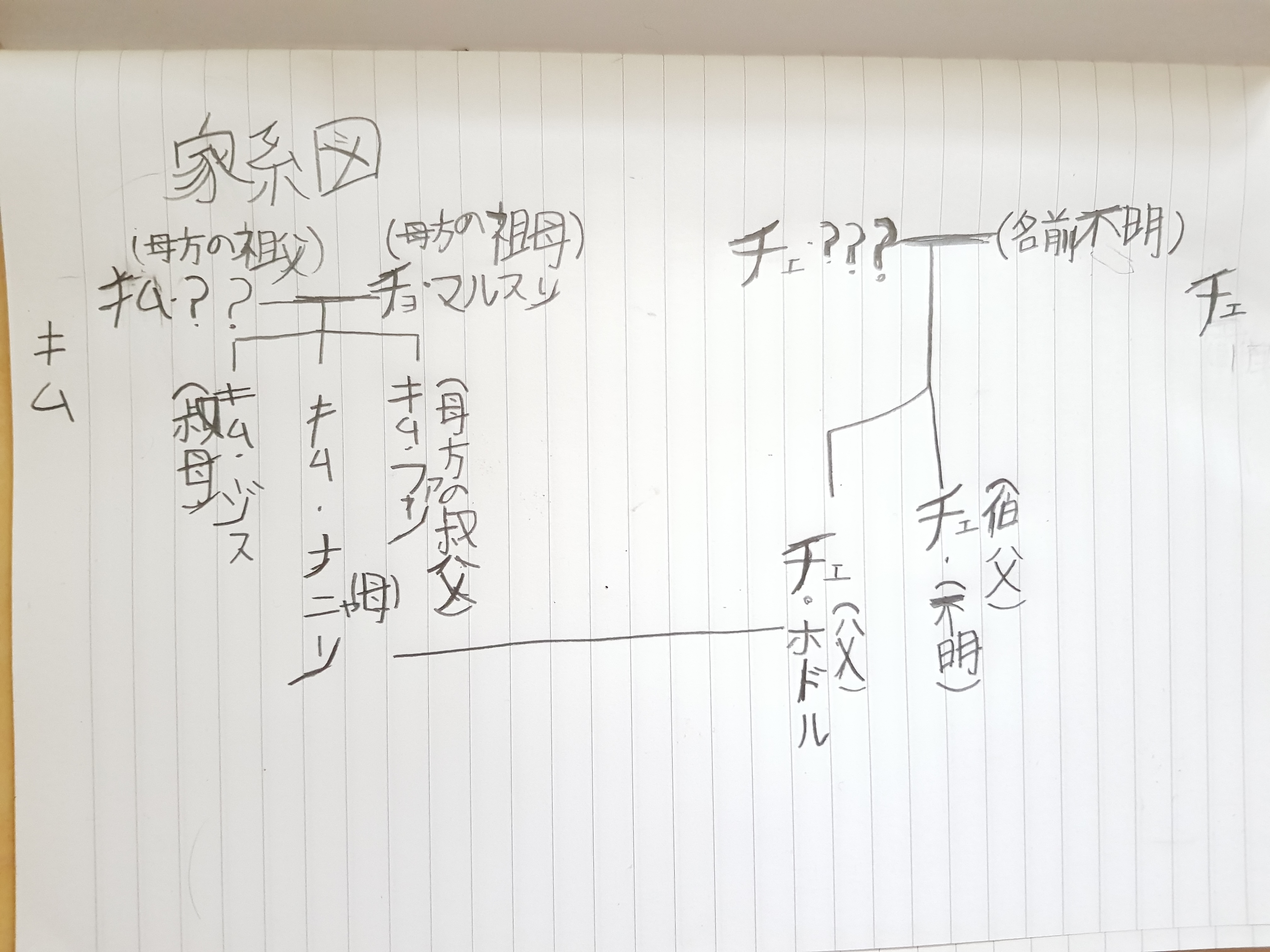 「ハロージャドゥ」の主人公の家族の日本語の家系図である。